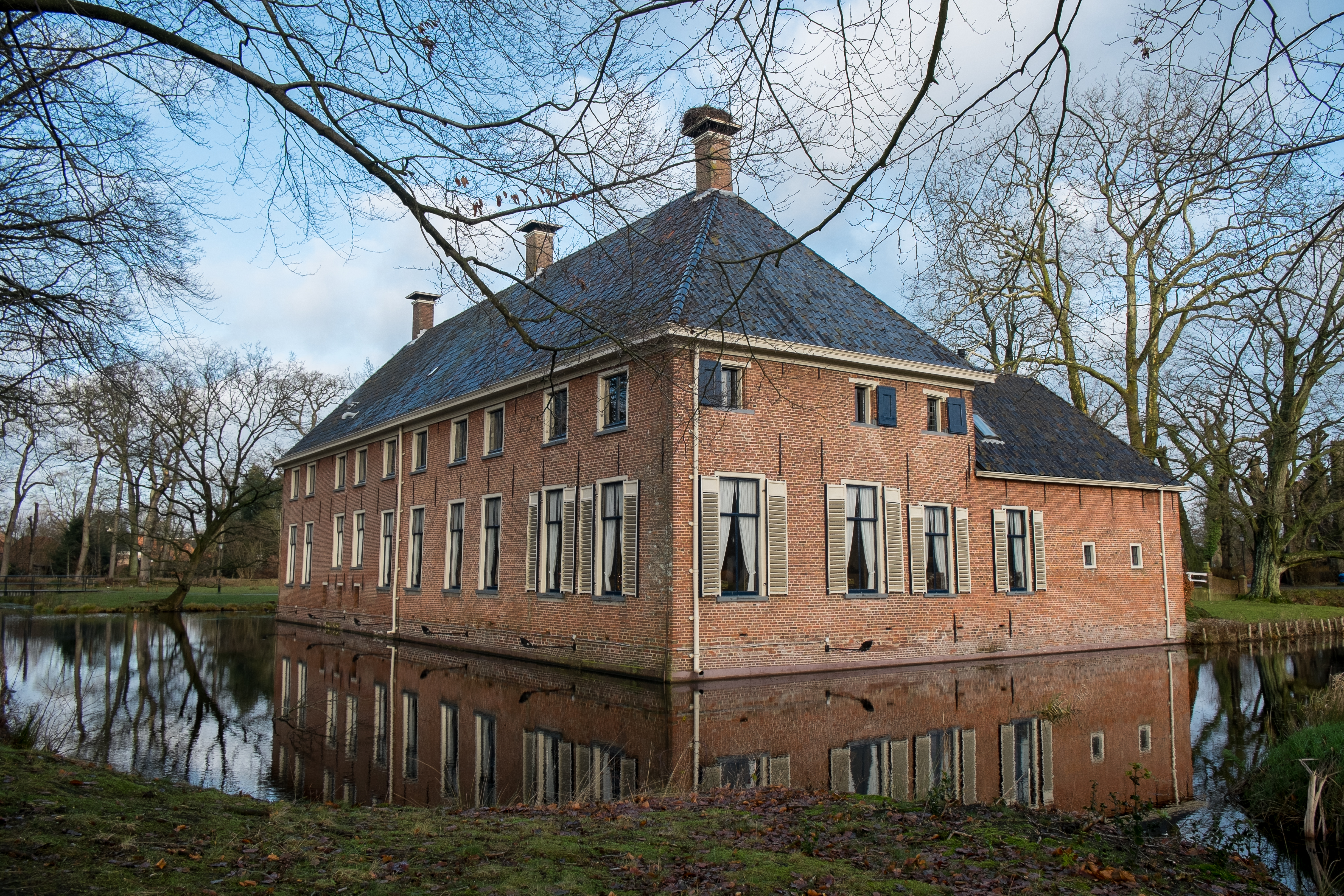 Havezathe Mensinge